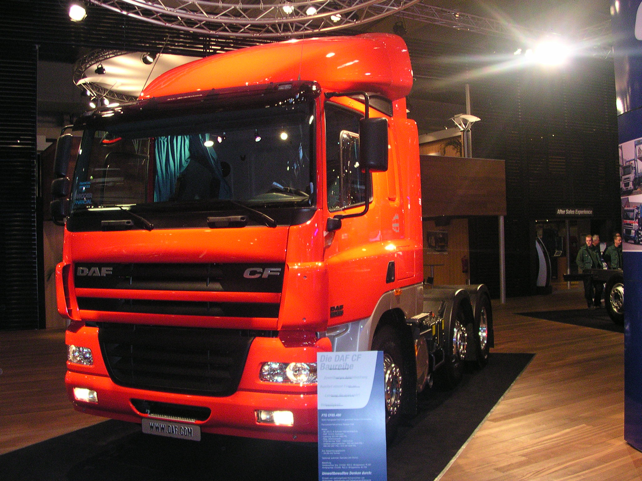 vierachsiger DAF CF Kipper bei der Internationalen Automobilausstellung in Hannover